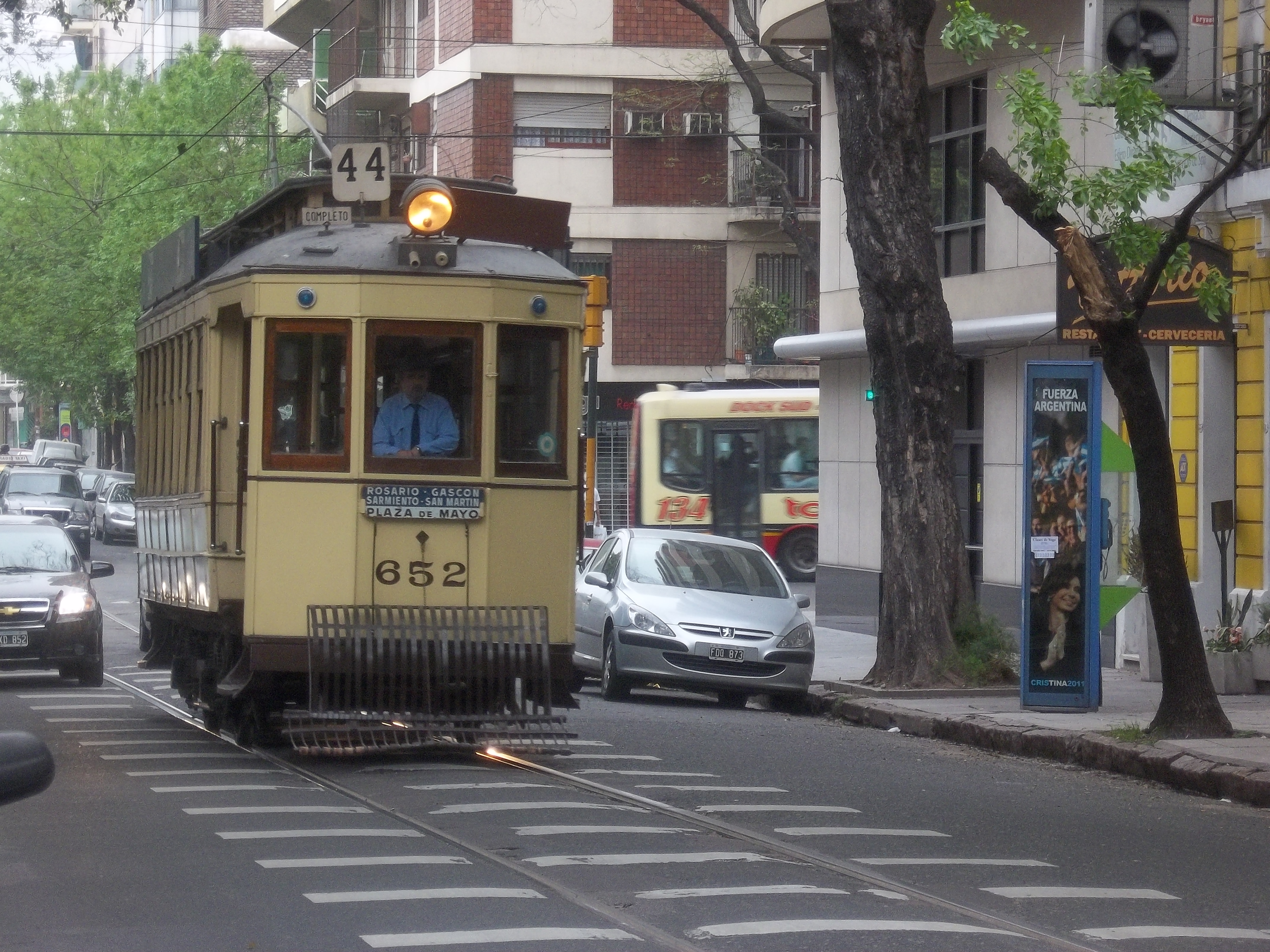 Tranvía 652 de la Asociación Amigos del Tranvía en la calle Emilio Mitre esquina avenida Pedro Goyena, barrio de Caballito, Ciudad de Buenos Aires, Argentina.